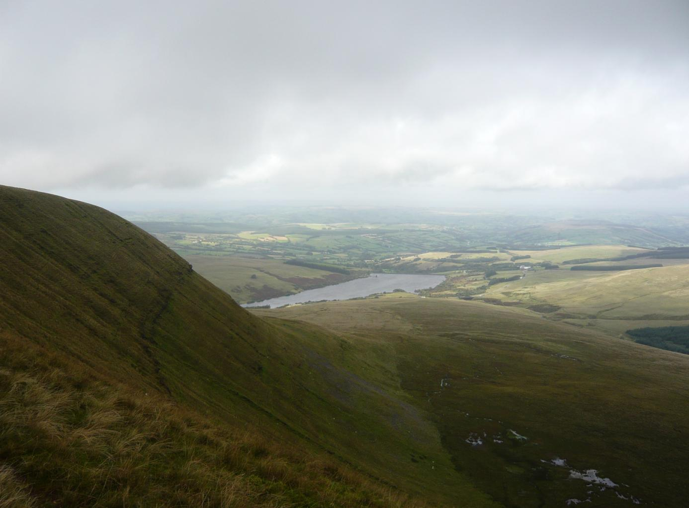 fan gyhirych